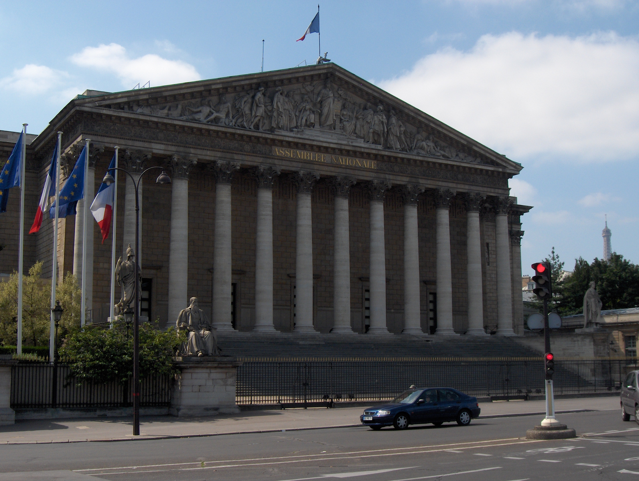 Photo du Palais Bourbon, Assemble Nationale, Quai d'Orsay Paris 7eme